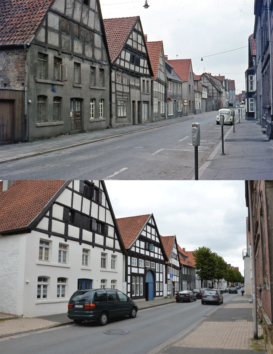 Lemgo Echternstraße 41-45 im Jahre 1971 (Bild oben) und 2011. Alle drei Häuser sind Fachwerkbauten aus dem Mittelalter und wurden um 1990 Kernsaniert.